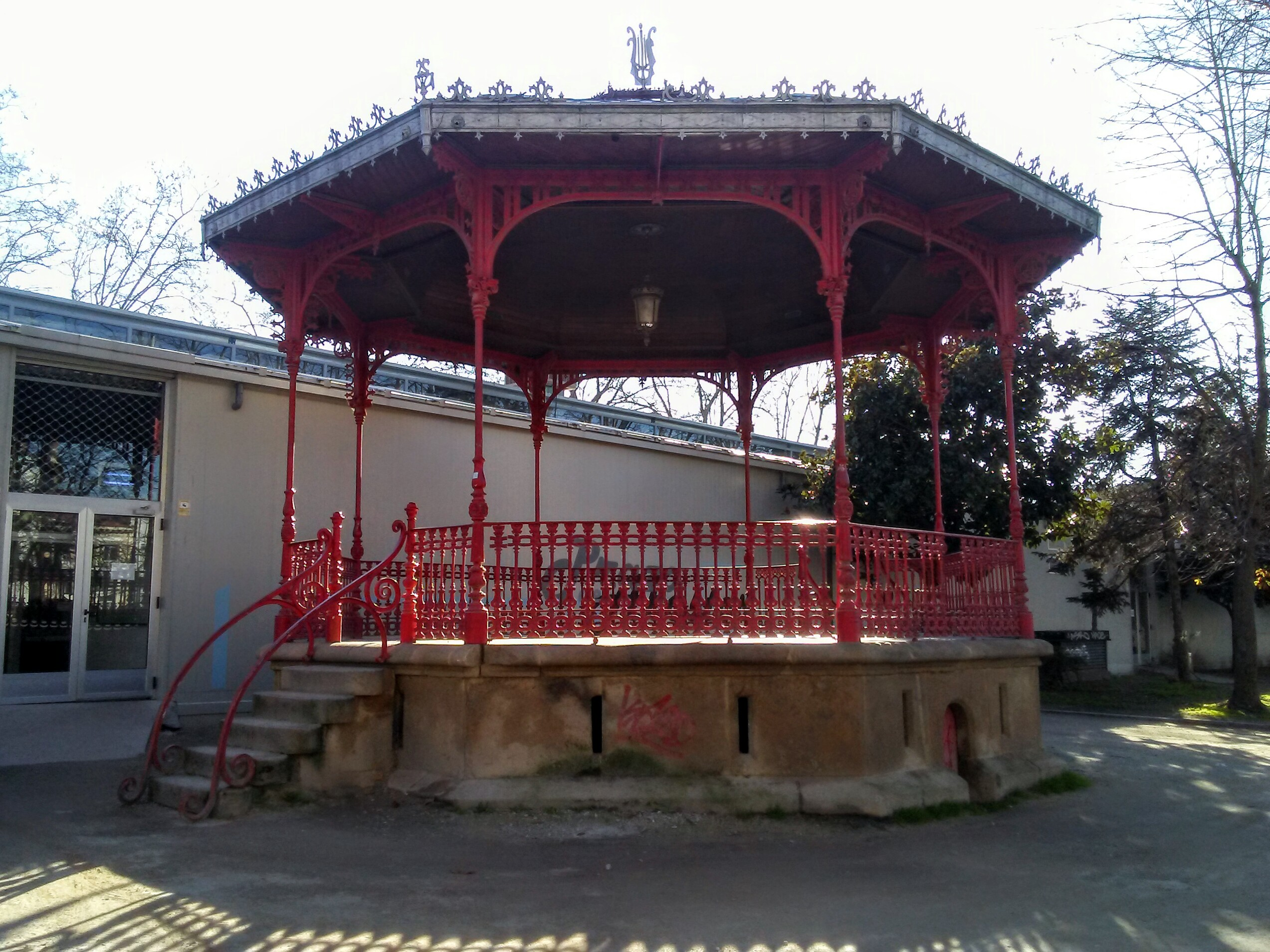 Templete de la Alameda (Ourense)